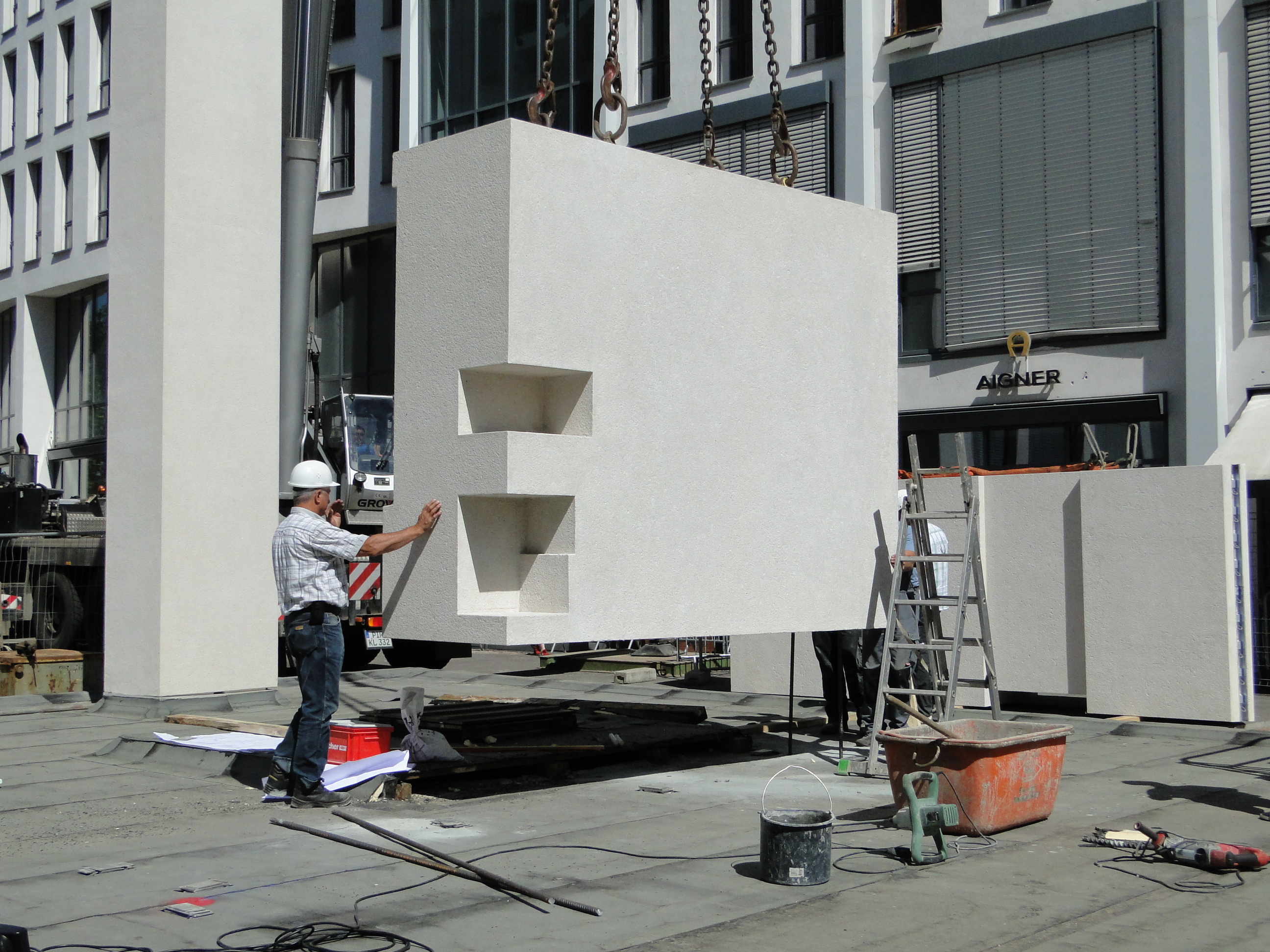 Bau der Gedenkstätte Busmannkapelle: Eröffnung des zweiten Bauabschnitts mit Versetzung der ersten Betonbauteile der Raumschale.